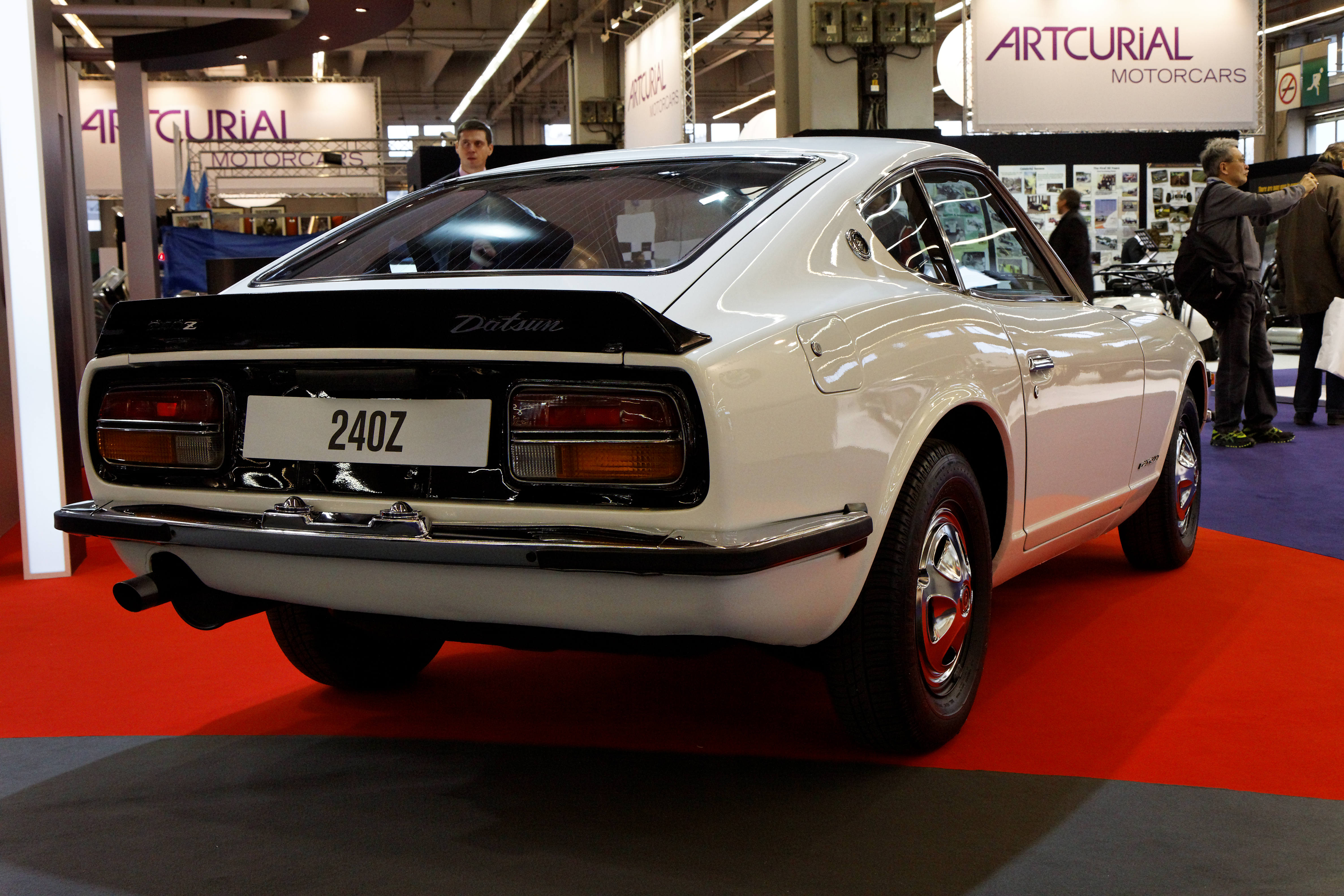 Photographie prise lors du salon rétromobile 2011 à Paris, porte de Versailles.